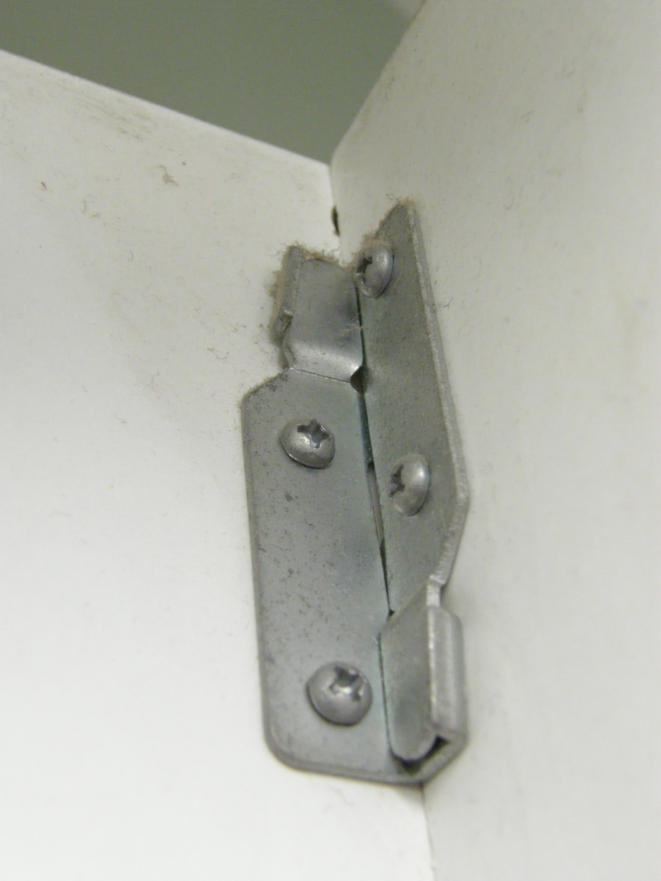 Photo d'une ferrure renforçant l'assemblage d'un meuble en kit.